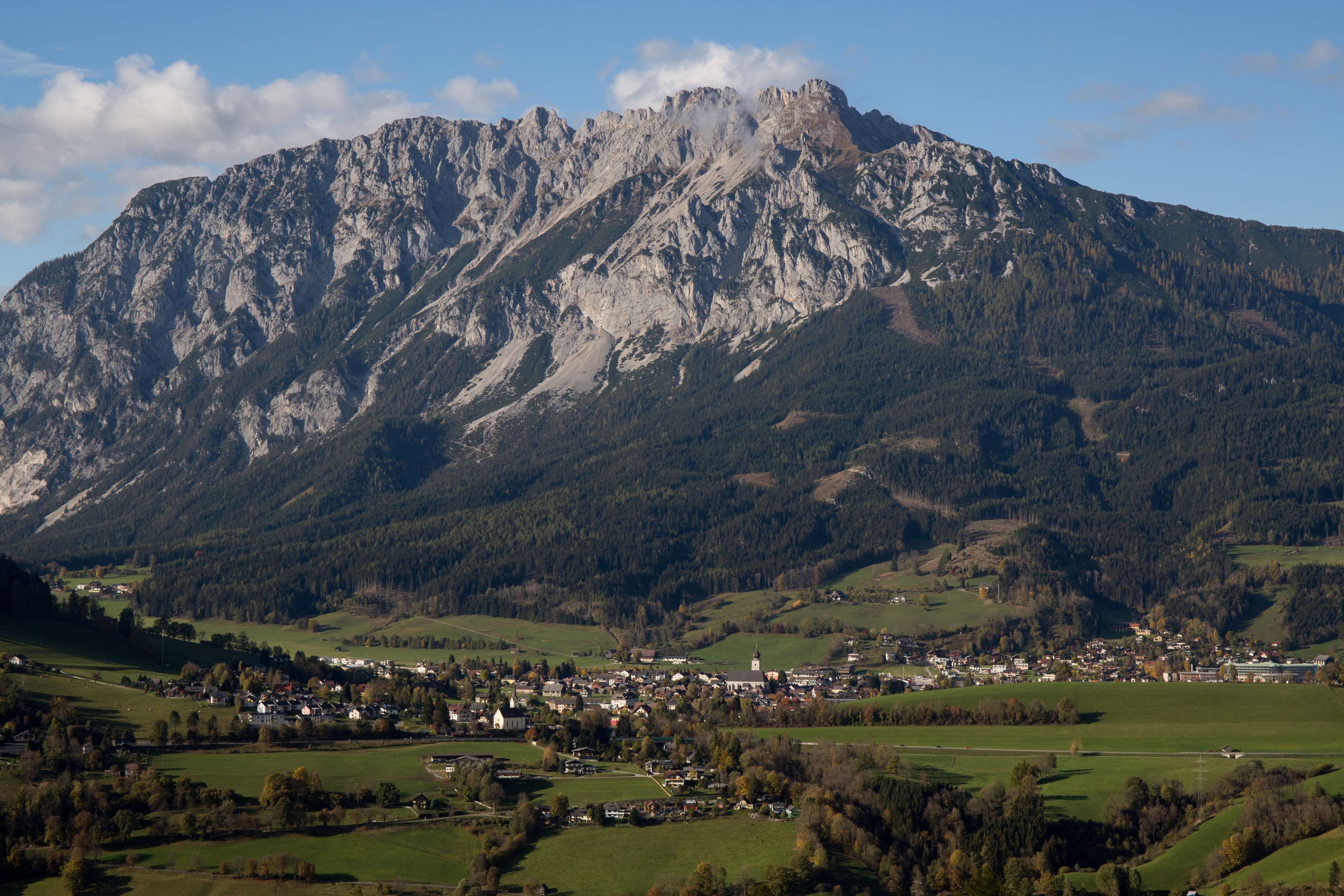 Gröbming im Ennstal, Steiermark, Austria